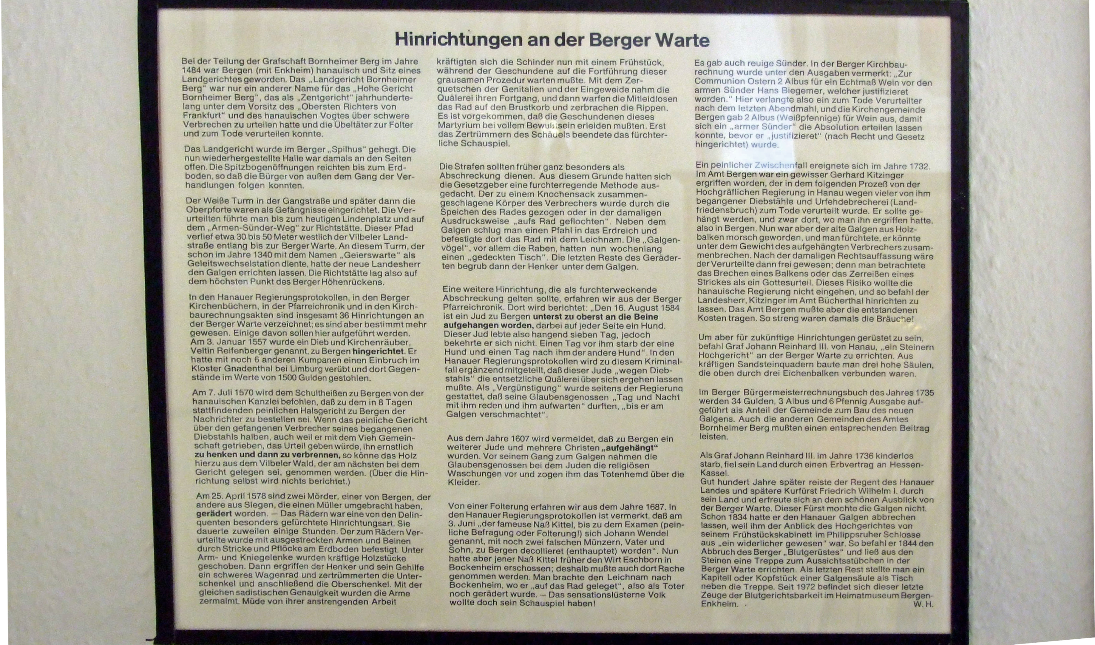 Geschichte der Hinrichtungen an der Berger Warte, Text von Werner Henschke, (verstorbener, ehemaliger Volksschullehrer und Initiator des Heimatmuseums)